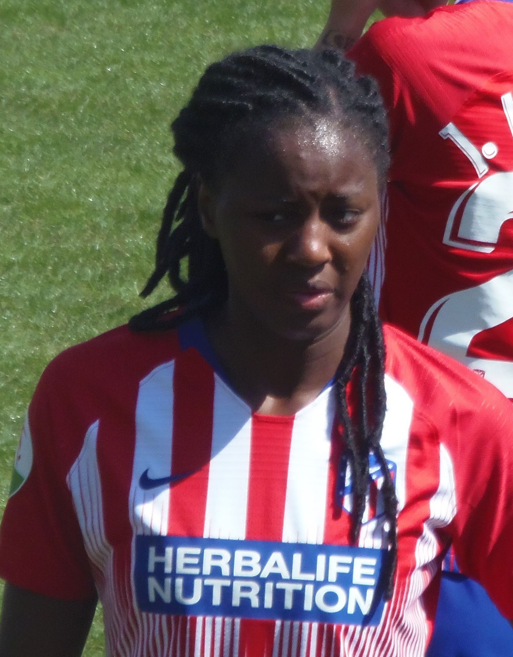 Tounkara en septiembre de 2018